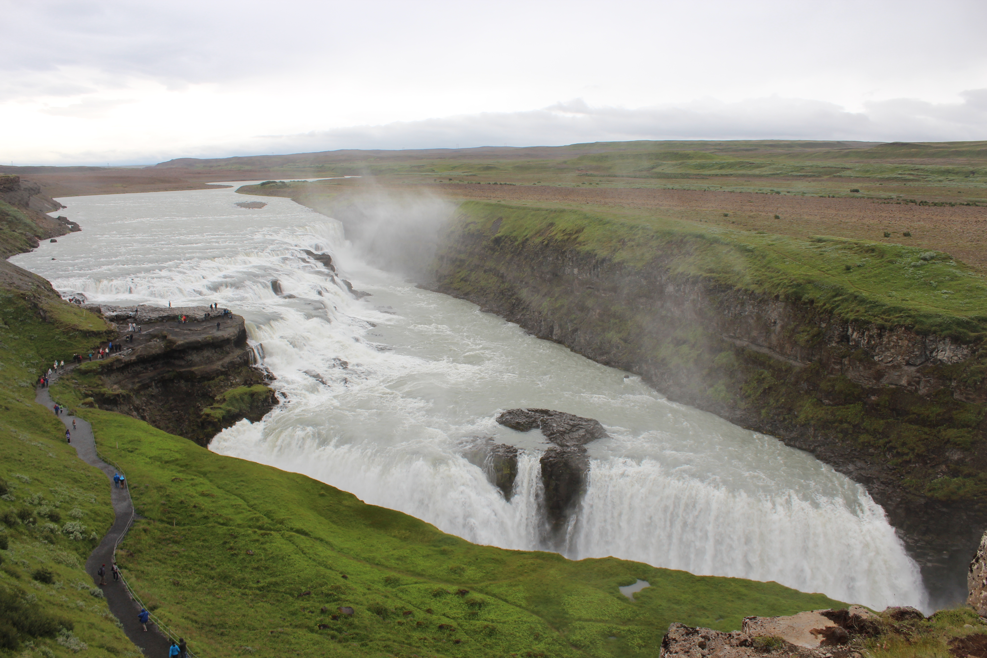 De Gullfoss an Island